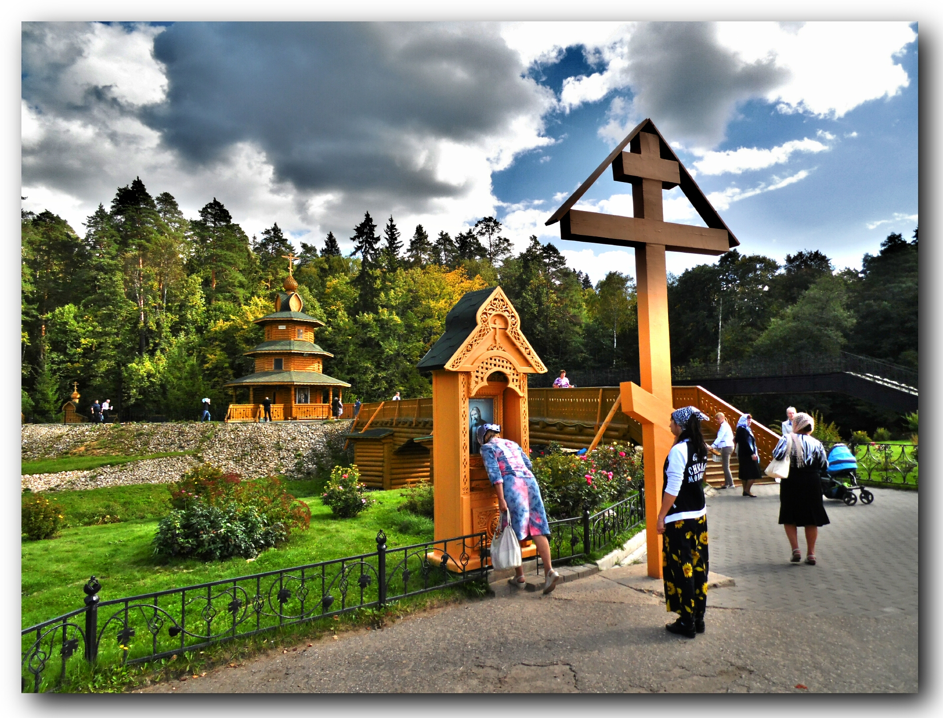 О происхождении источника близ поселка Цыгановка местные жители рассказывают, что сам батюшка Серафим явился на берегу реки Сатис-там, где проходило ограждение секретного объекта, расположенного на территории Саровского монастыря. Был преподобный Старец в белом балахончинке и с посохом в руках. Трижды он стукнул посохом о землю - образовались три источника. При этом батюшка сказал, что сюда буду- ходить люди и получать исцеления. Источник: сайт